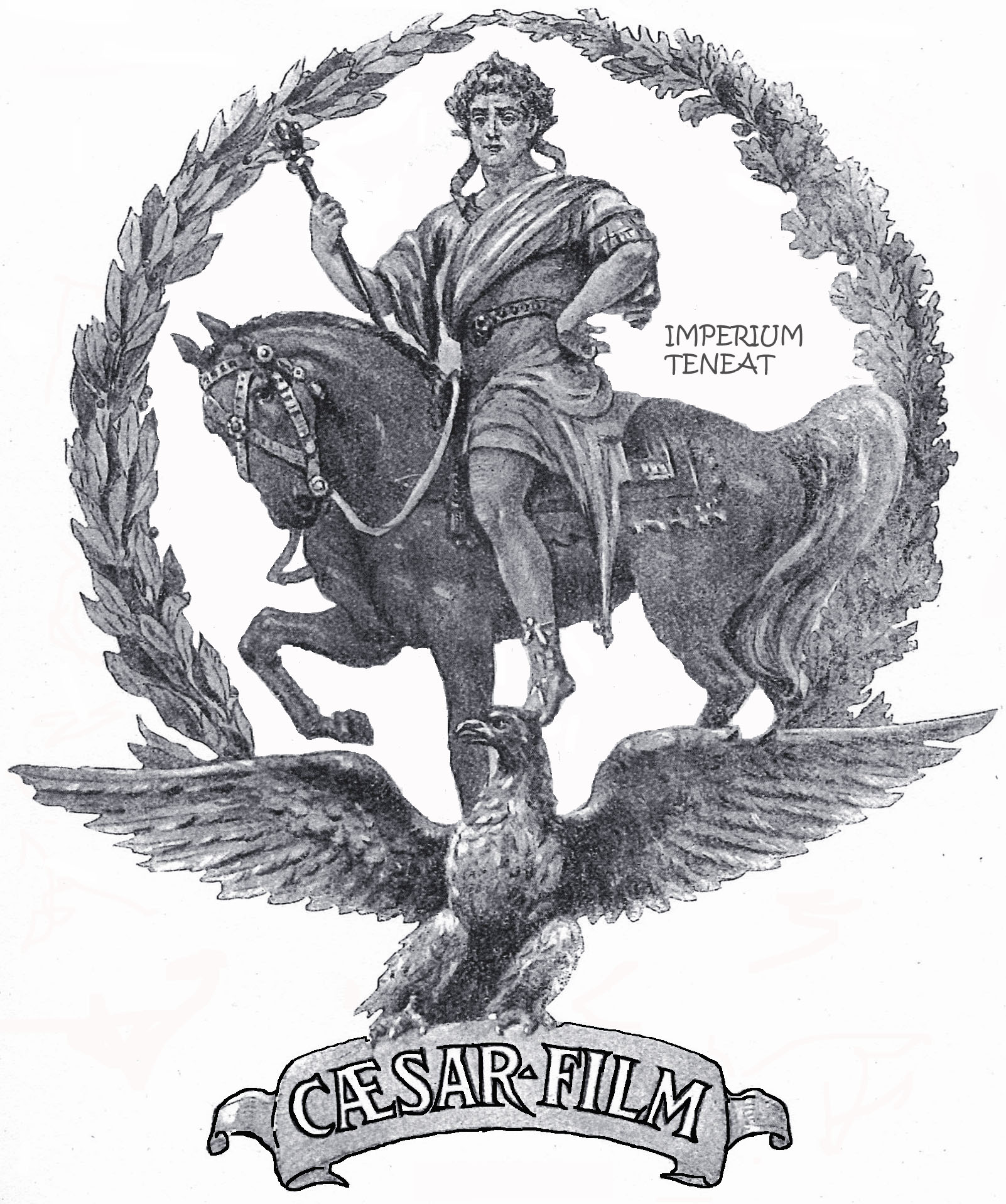 Il logo aziendale della prima "Caesar film" (1914 - 1919)